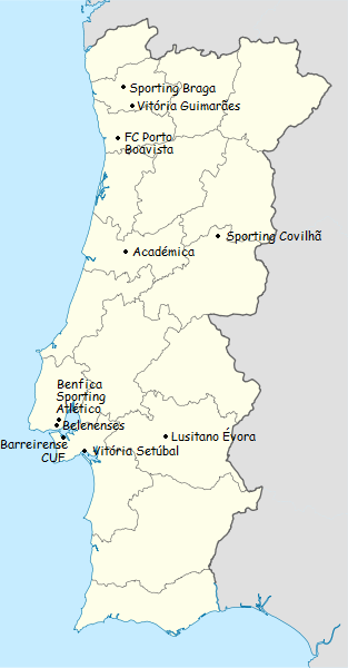 Carta dos clubes participantes do campeonato de portugal de futebol de primeira divisao 1954-1955